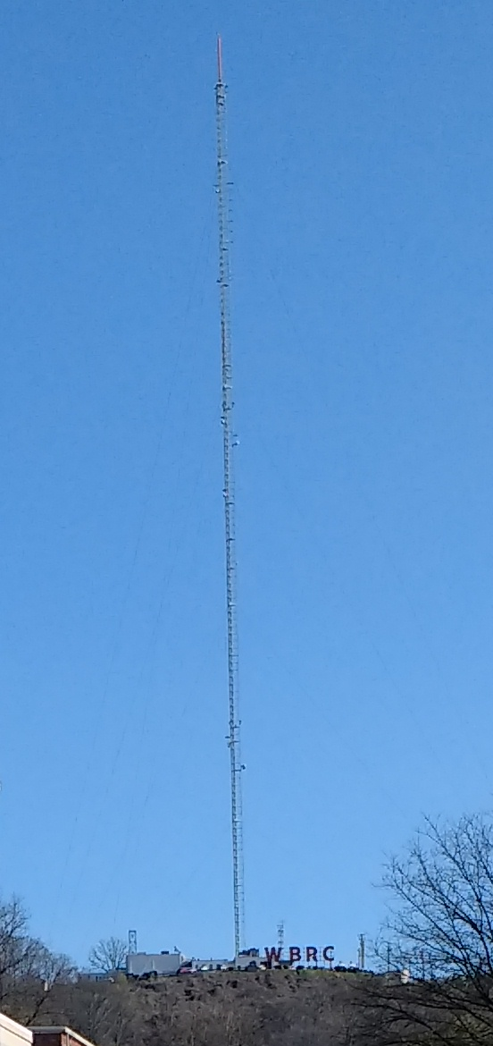 WBRC transmitter in Birmingham, Alabama